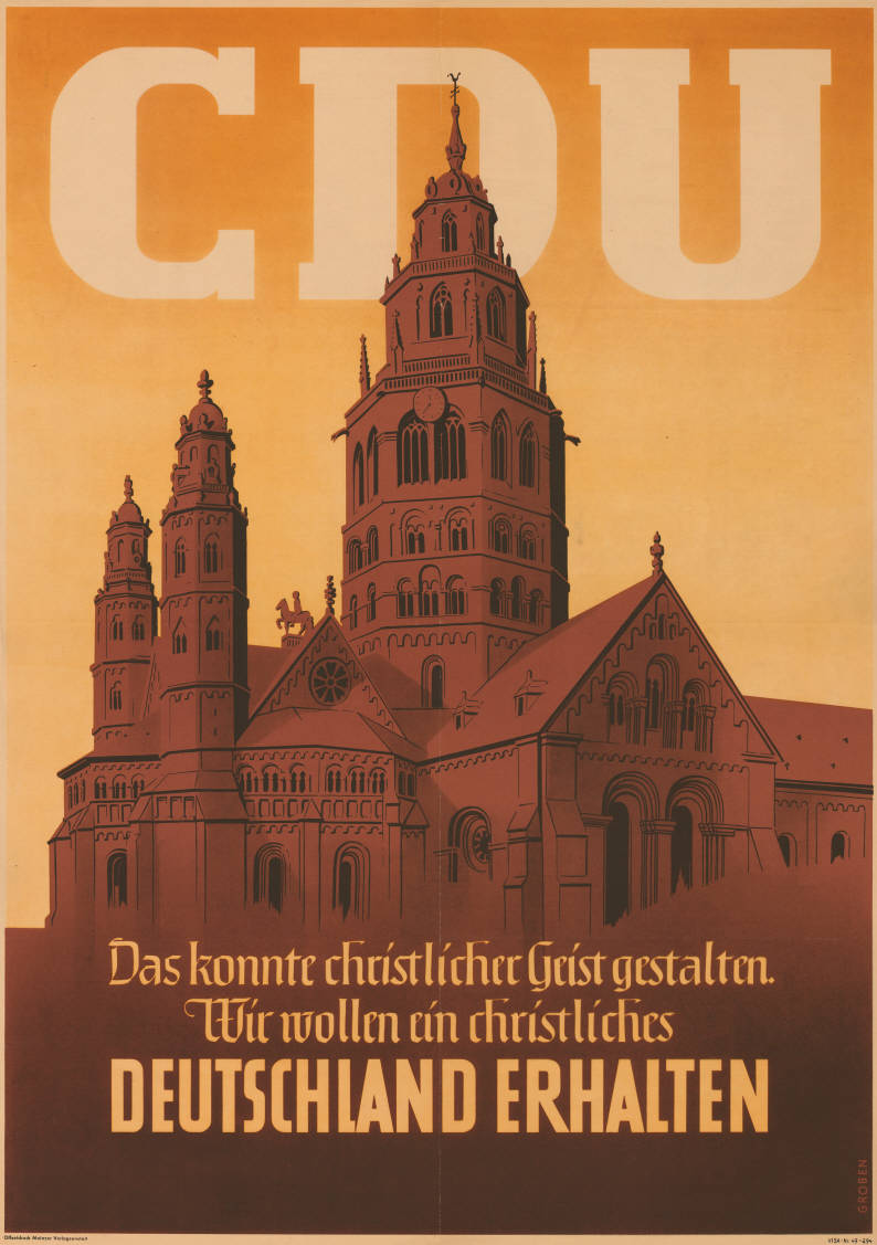 CDU Das konnte christlicher Geist gestalten. Wir wollen ein christliches Deutschland erhalten Abbildung: Mainzer Dom Plakatart: Motiv-/Textplakat Künstler_Grafiker: GROBEN Drucker_Druckart_Druckort: Offsetdruck Mainzer Verlagsanstalt Visa-Nr. 49-294 Objekt-Signatur: 10-001: 8 Bestand: Plakate zu Bundestagswahlen (10-001) GliederungBestand10-18: Plakate zu Bundestagswahlen (10-001) » Die 1. Bundestagswahl am 14. August 1949 » Motivplakate Lizenz: KAS/ACDP 10-001: 8 CC-BY-SA 3.0 DE